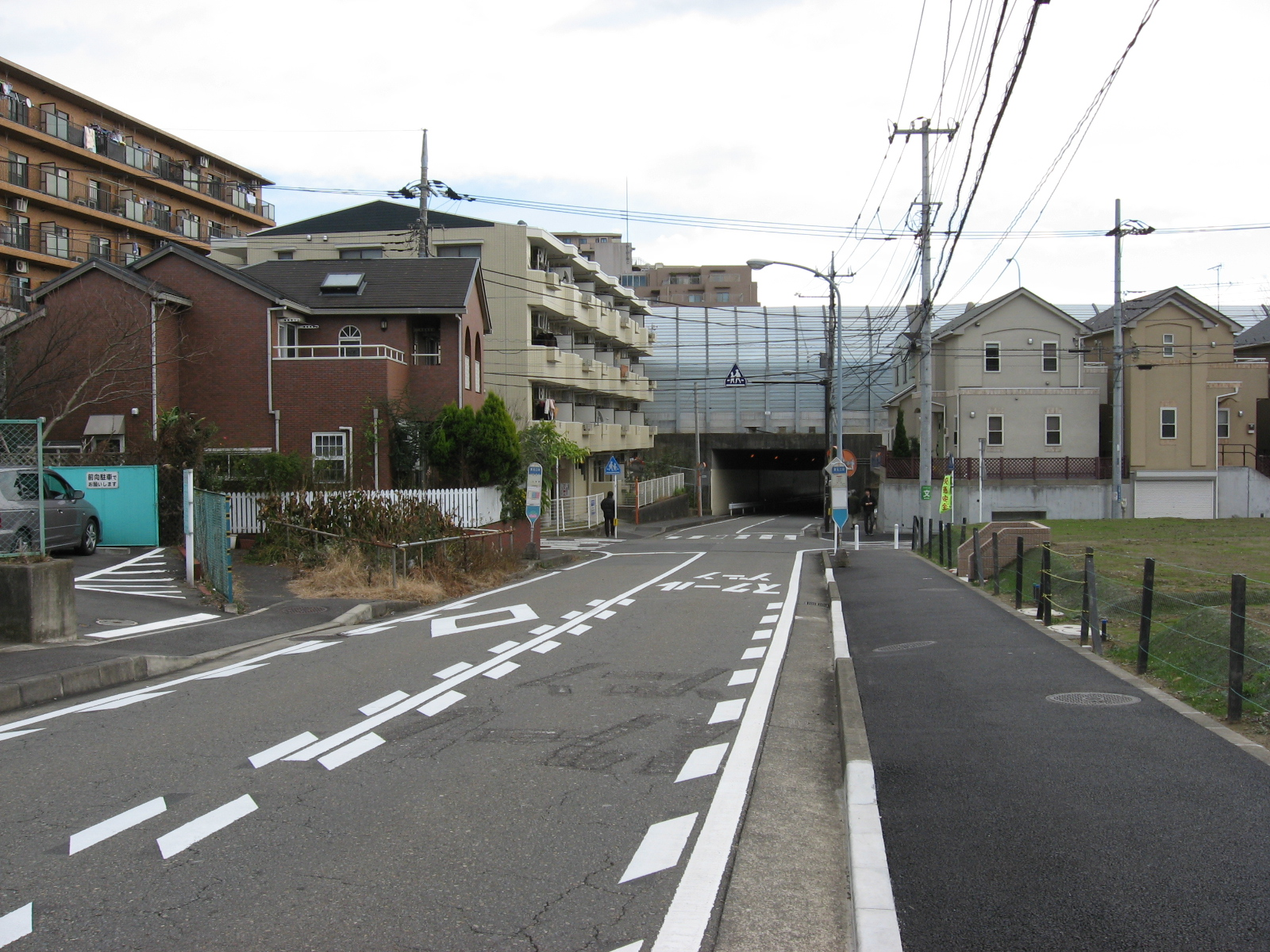 東名江田バス停付近